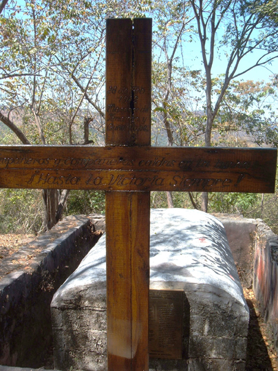 Monumento por honorigi la viktimojn pri la amasbuĉo ĉe Tenango kaj Guadalupe en Salvadoro, Centra Ameriko. Fotita je 2007.